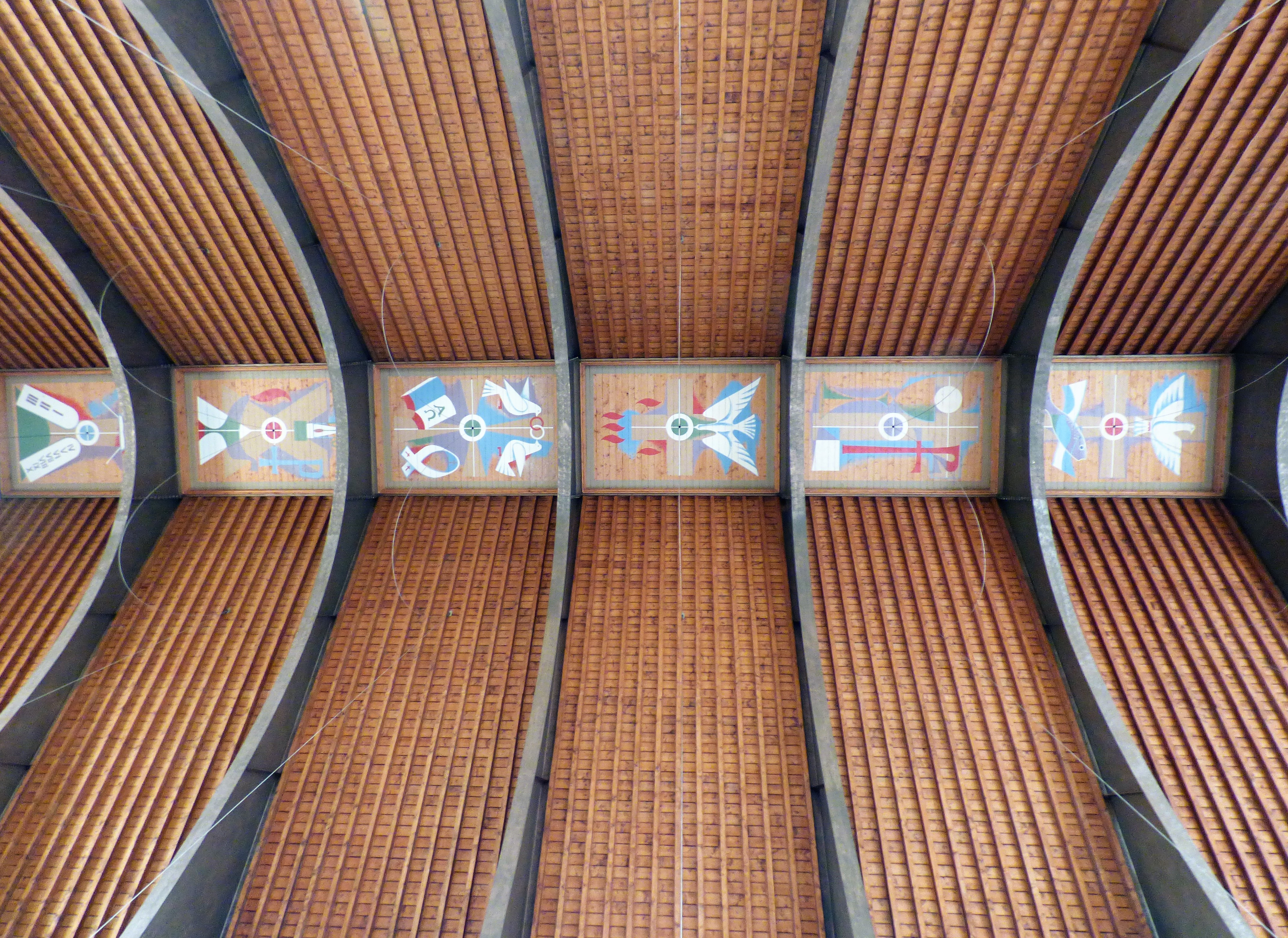 Pfarrkirche Donawitz (Steiermark) Decke